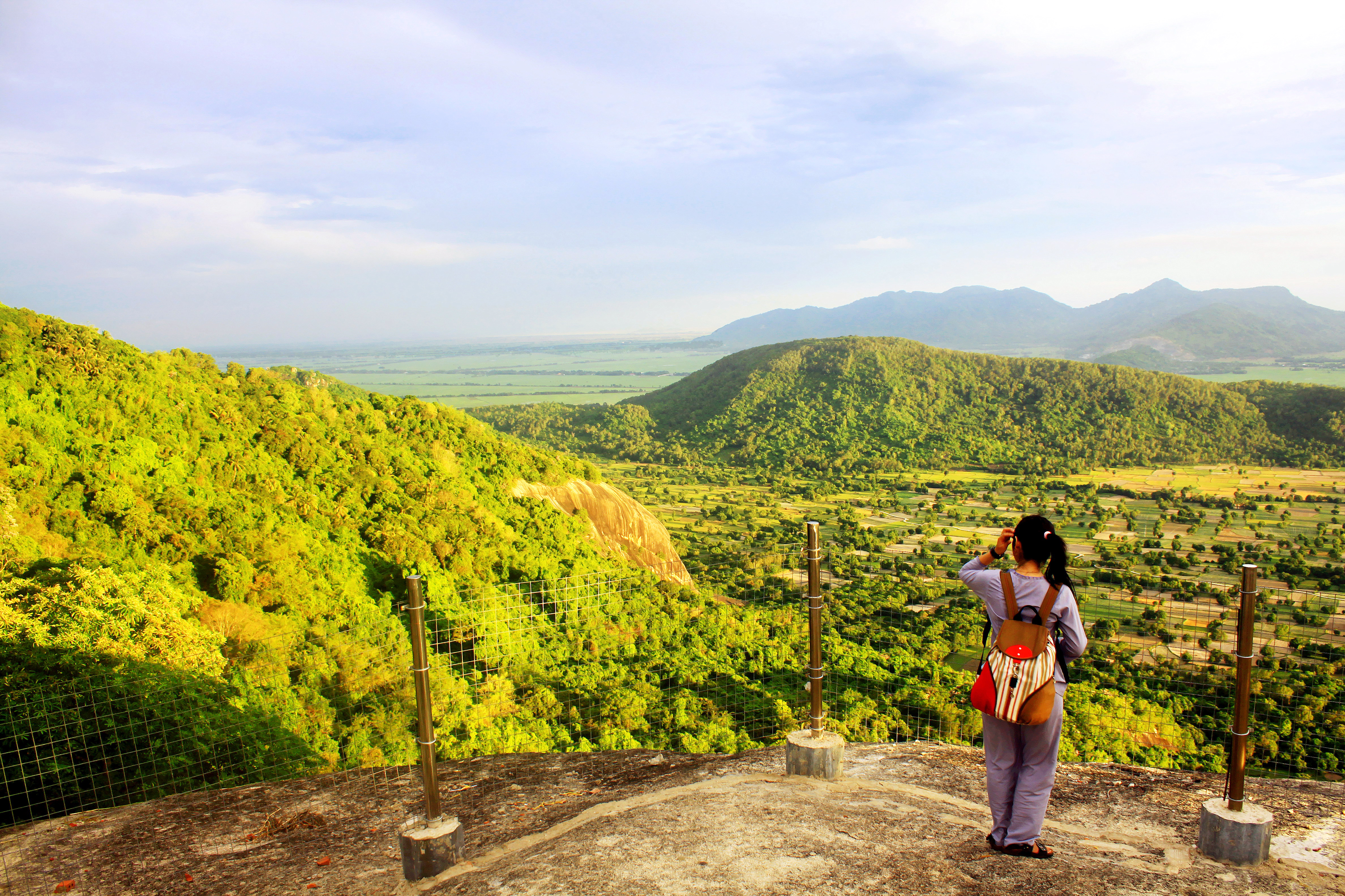 Trên đình núi Cô Tô ở Tri Tôn, An Giang, Việt Nam.